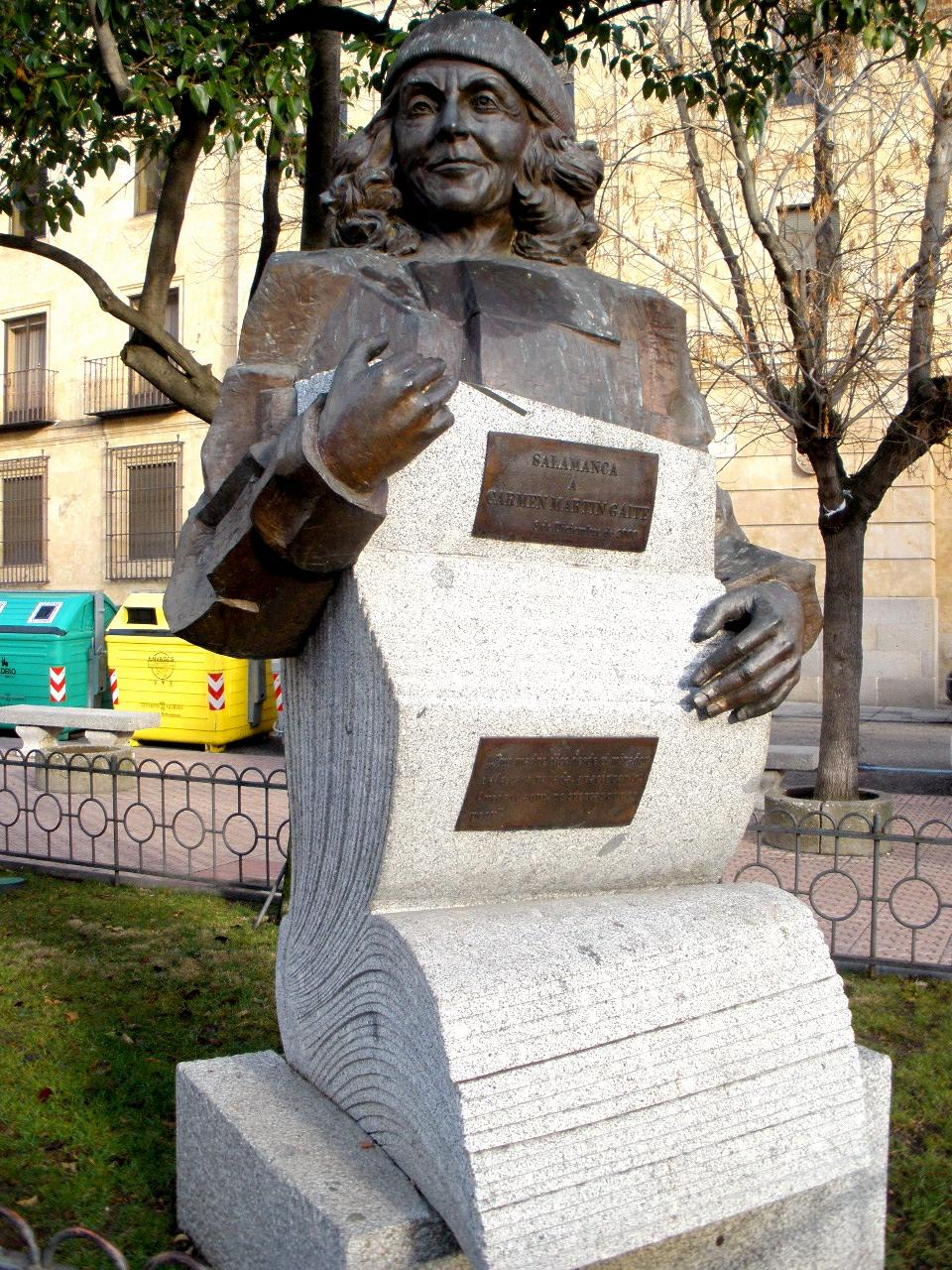 Monumento a Carmen Martín Gaite, obra en bronce y granito gris de la escultora española Narcisa Vicente Rodríguez. La escultura, de 280 cm de altura, fue inaugurada en la plaza de los Bandos de Salamanca el 8 de diciembre de 2000, meses después de la muerte de la escritora.